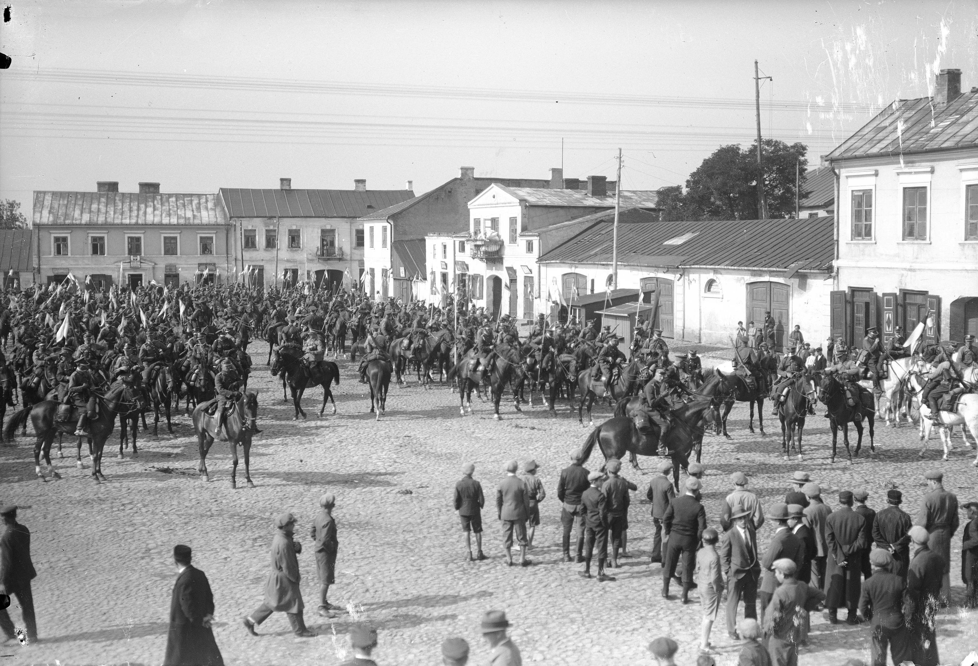 Pułk na rynku w Mszczonowie.